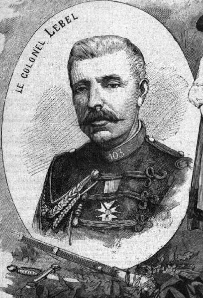 Nicolas Lebel. Illustration en une du Supplément illustré du Petit Parisien du 26 janvier 1890.